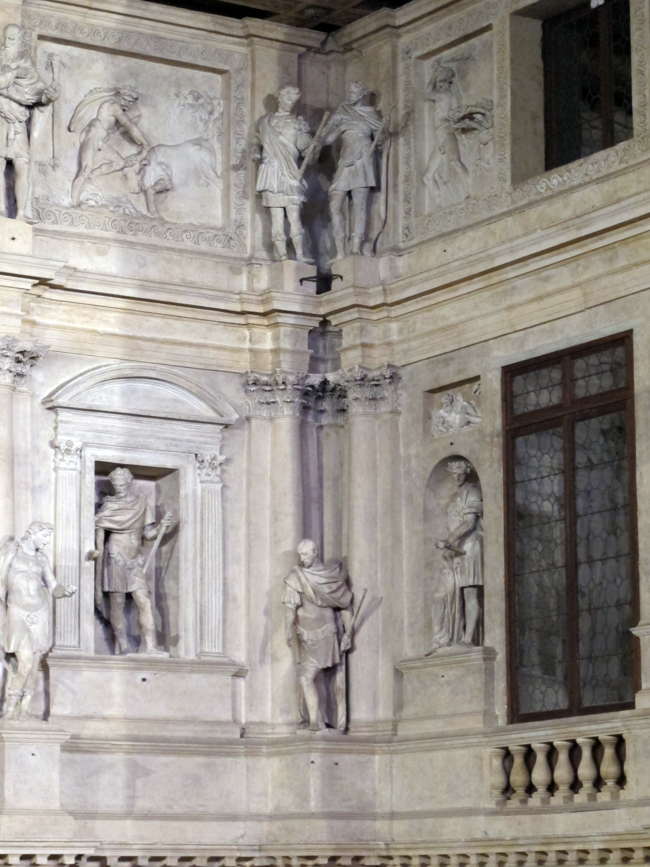 Teatro olimpico, scena, statue